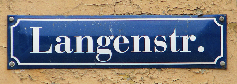 Dieses Bild zeigt ein Straßenschild Stralsunds.